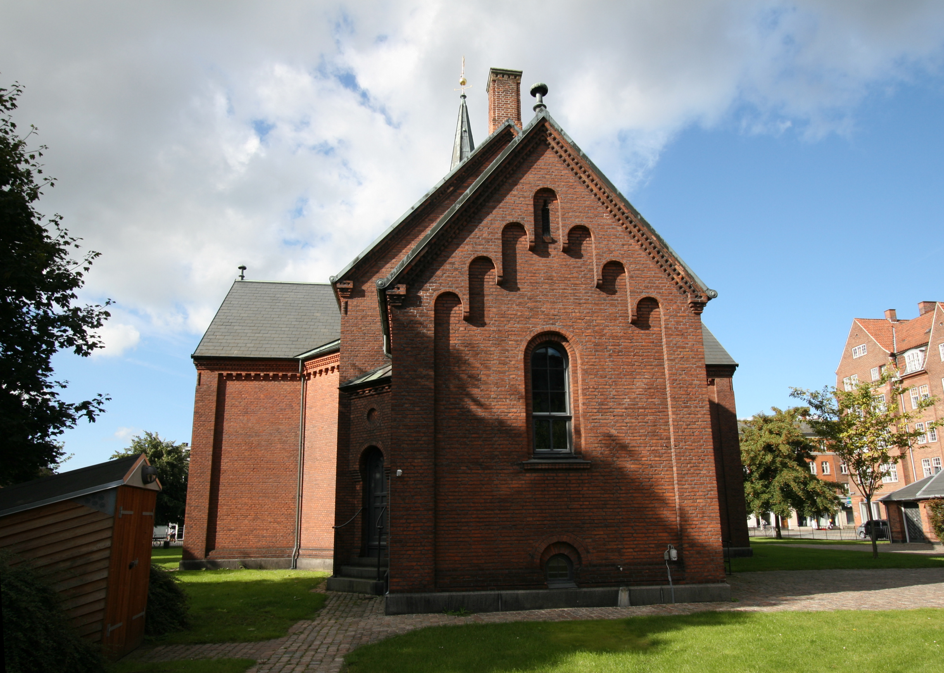 Sundby Kirke, Amager, Copenhagen, Denmark. From east